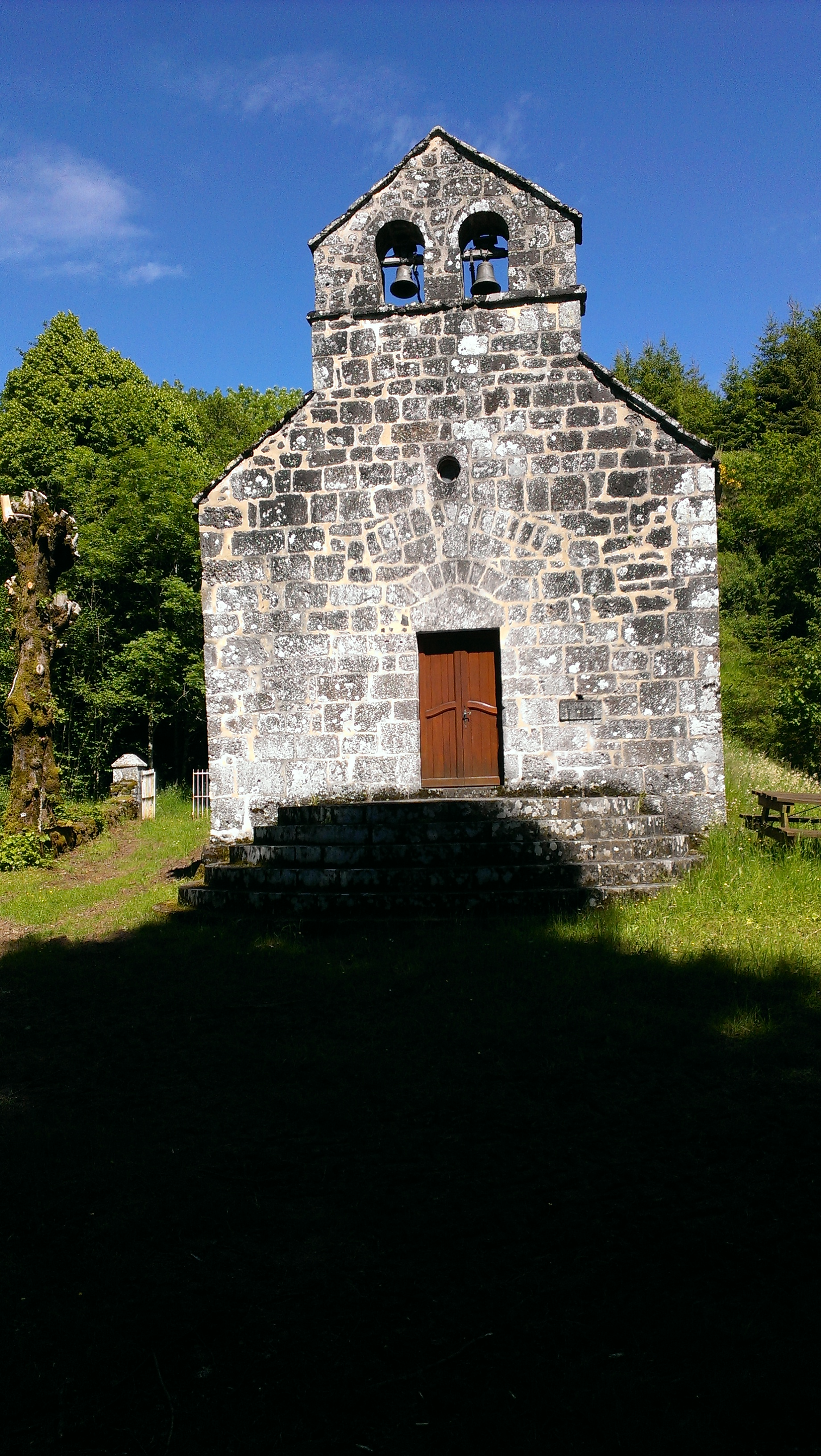 Chapelle Notre-Dame-de-Claviers (Inscrit) .